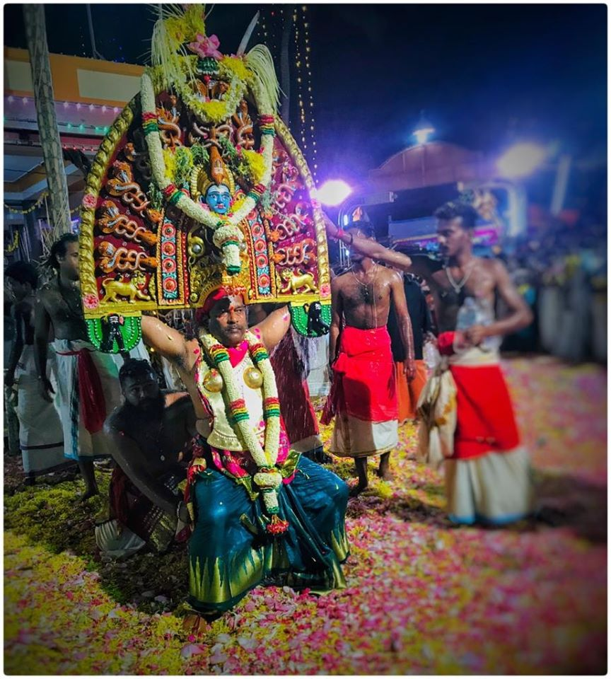 കളംകാവൽ